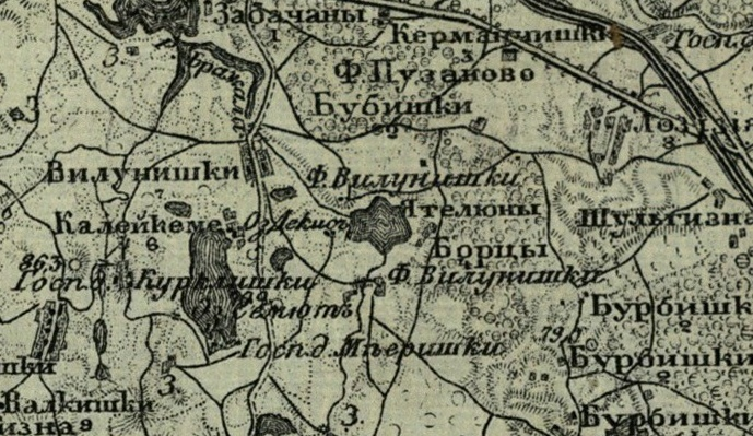 Vilūniškių km. apie 1865-1872